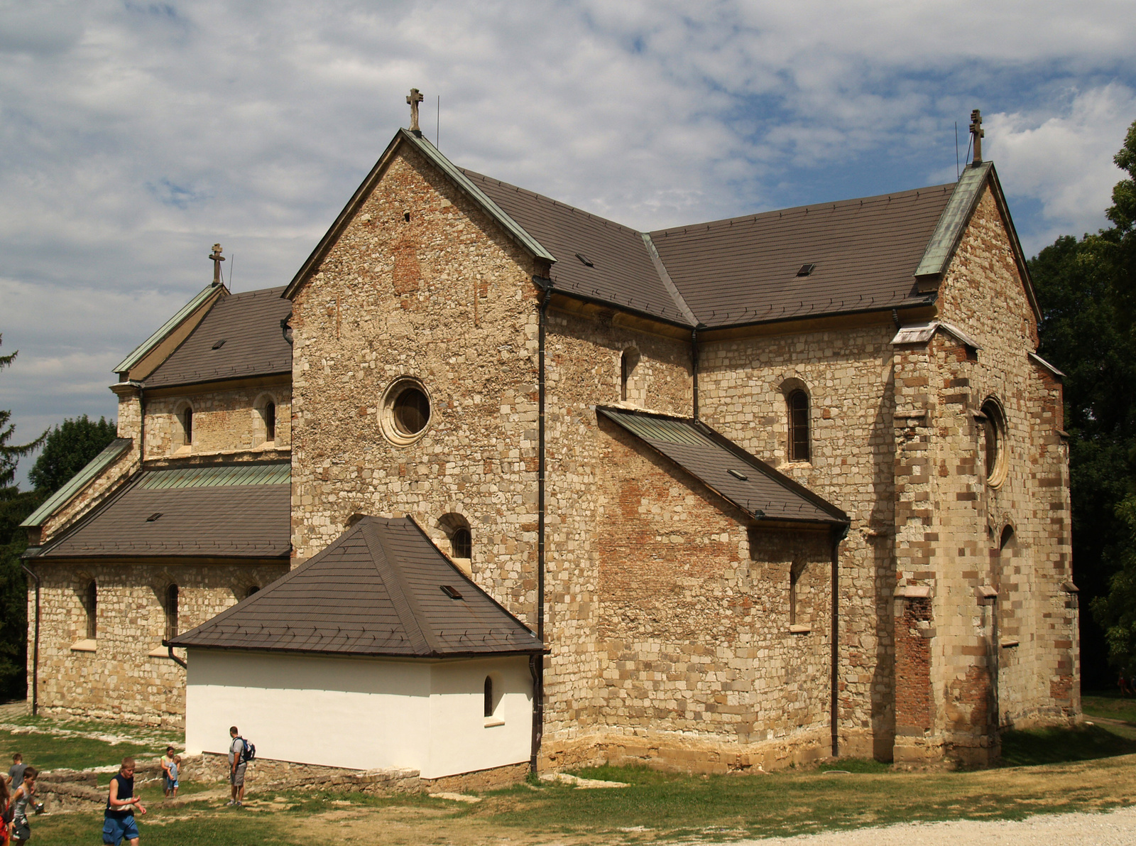 Ciszterci apátsági templom (Nagyboldogasszony) (Bélapátfalva, külterület 0185/1 hrsz. (Bélkő)) This is a photo of a monument in Hungary. Identifier: 5433